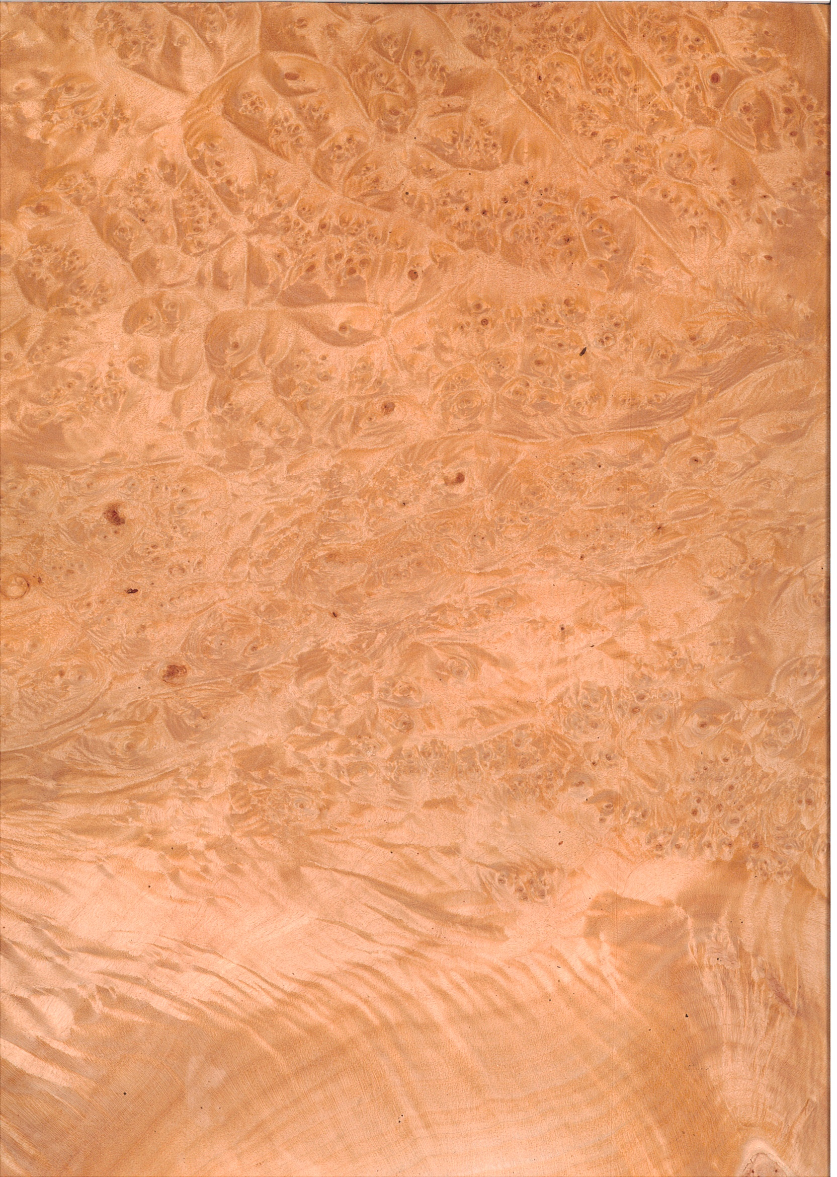 Acer